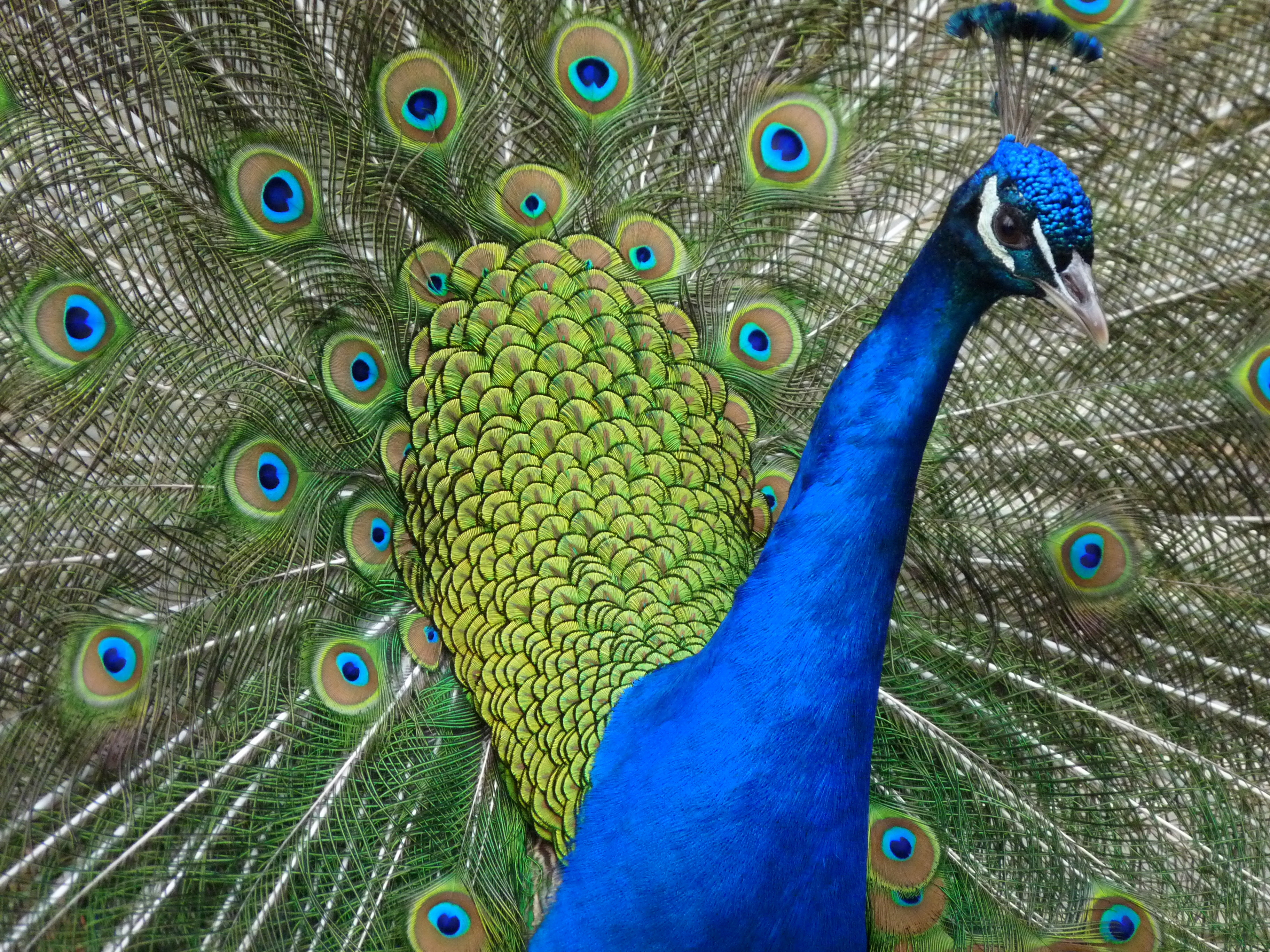 Tonos